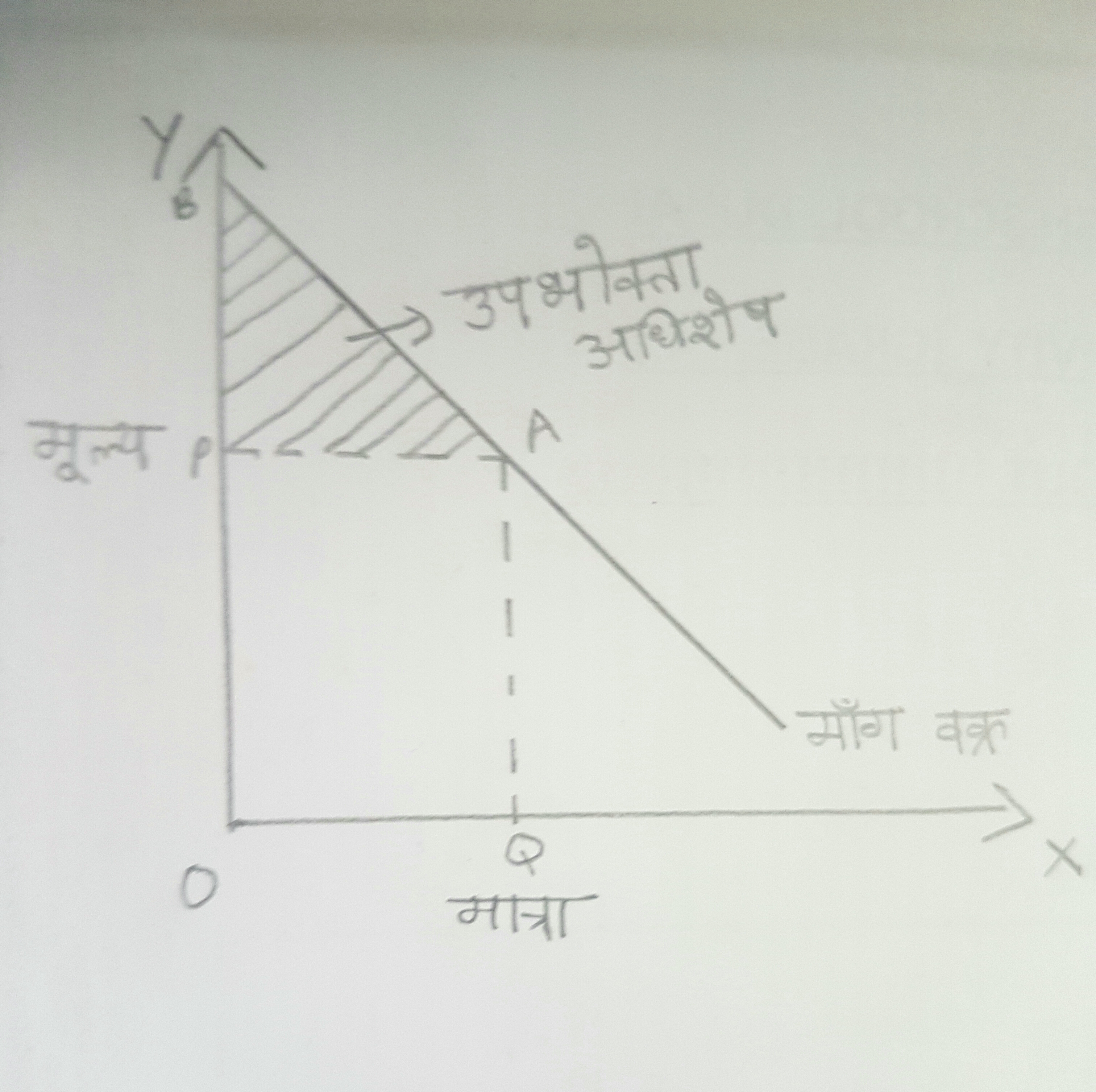 मांग वक्र द्वारा उपभोक्ता अधिशेष का प्रतिनिधित्व